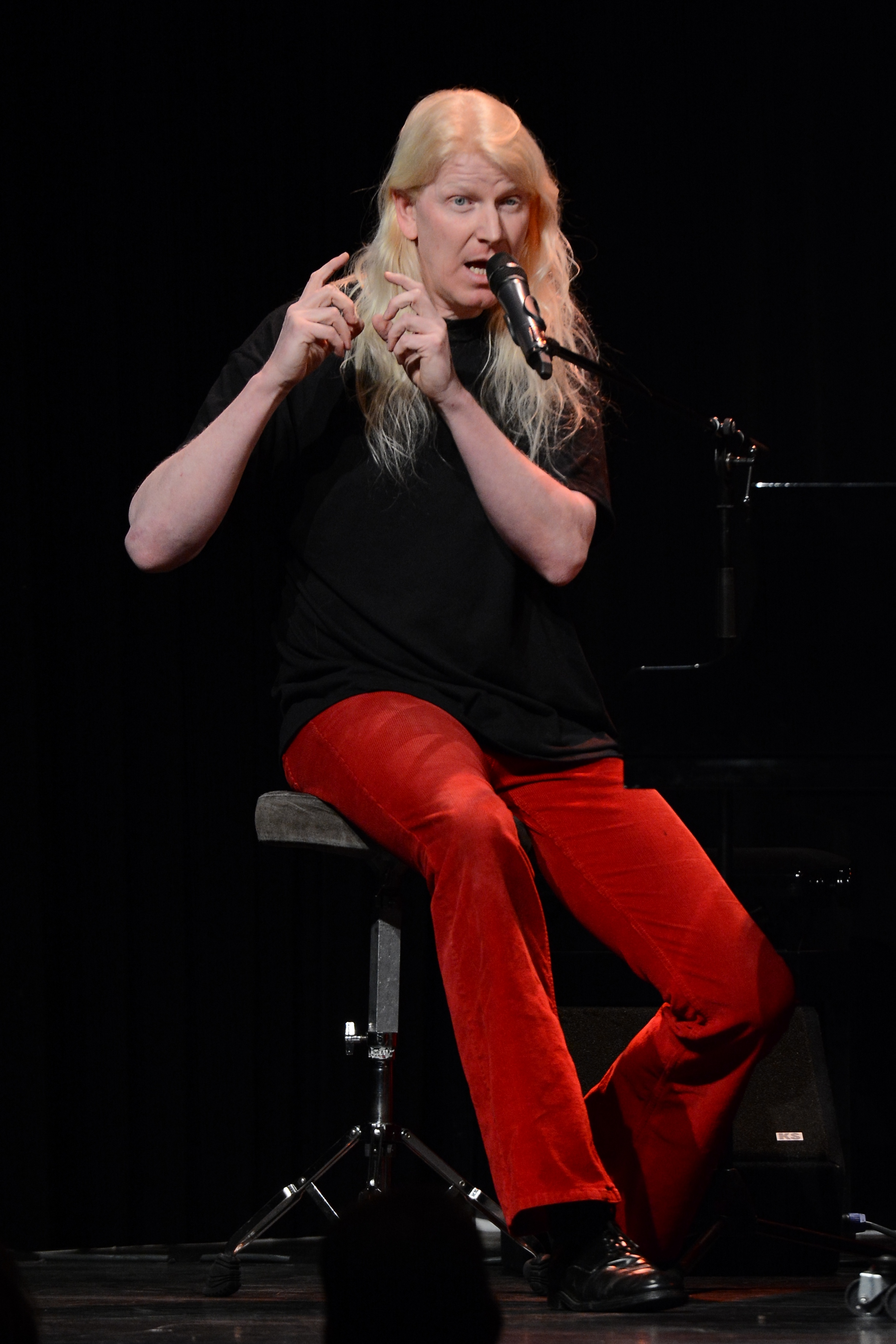 Gunzi Heil beim Unpolitischen Aschermittwoch 2014 im Ebertbad Oberhausen.